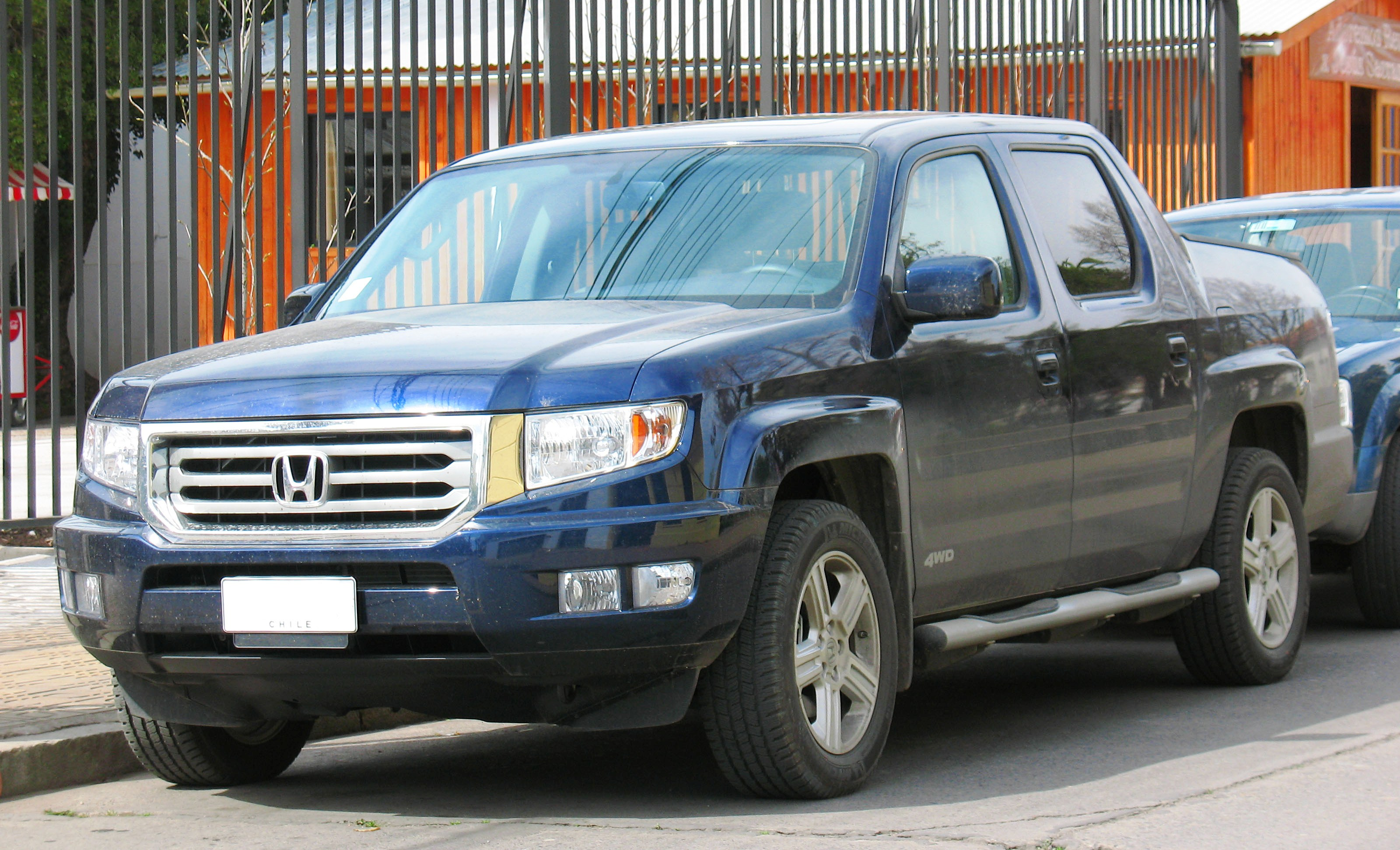 Honda Ridgeline RTL 2013